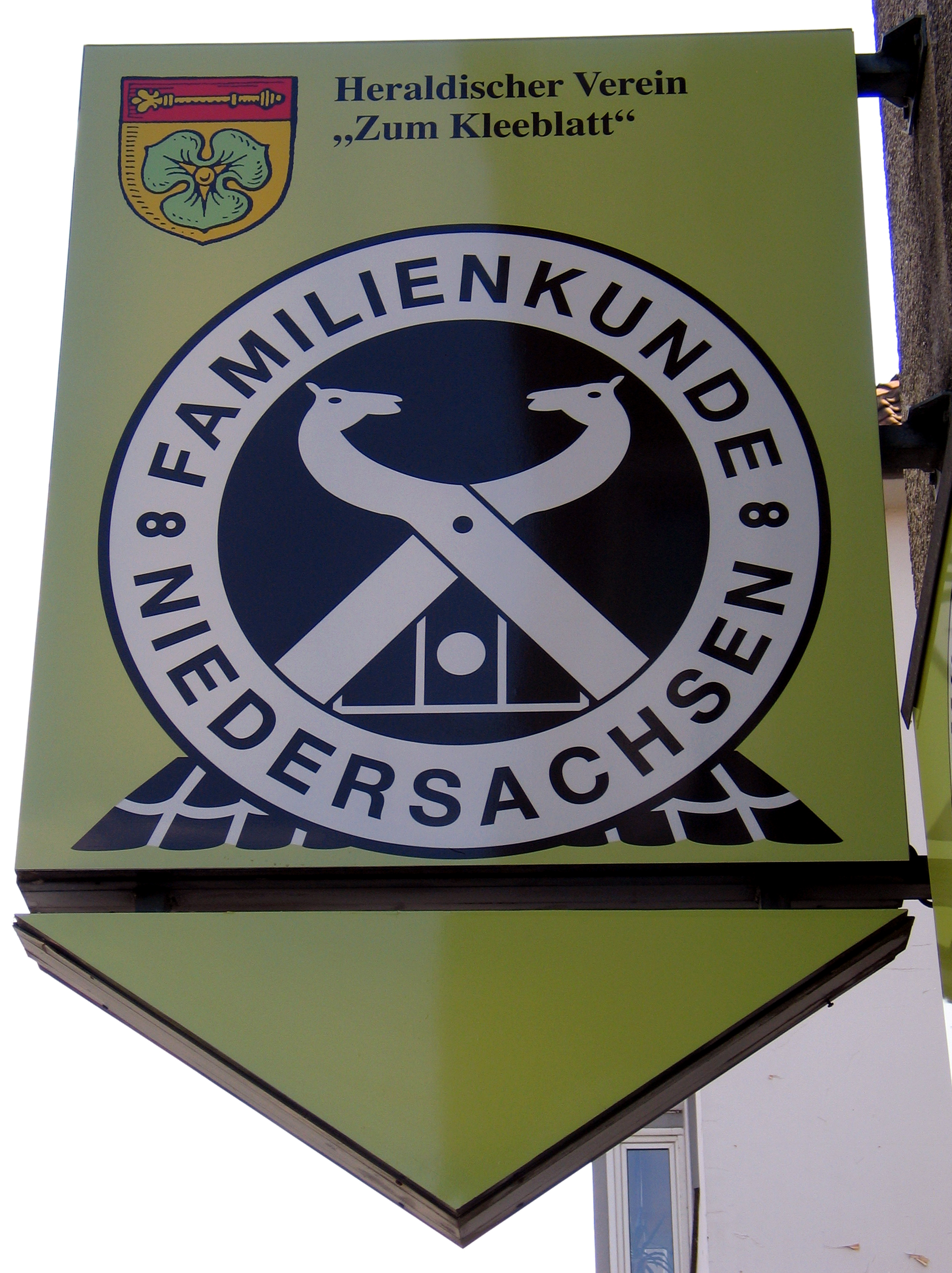 Gemeinsames Hinweisschild des Heraldischen Vereins „Zum Kleeblatt“ und dem Niedersächsischen Landesverein für Familienkunde ("Familienkunde Niedersachsen", abgekürzt NLF, Internetseite des Vereins: [1]), am gemeinsamen Vereinszentrum Rückertstraße 1 Ecke Humboldtstraße in 30169 Hannover (Calenberger Neustadt) ...